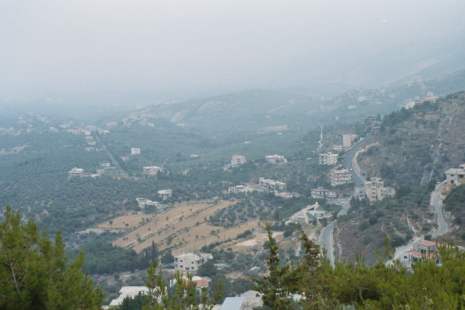 Village de Kfarfou Liban